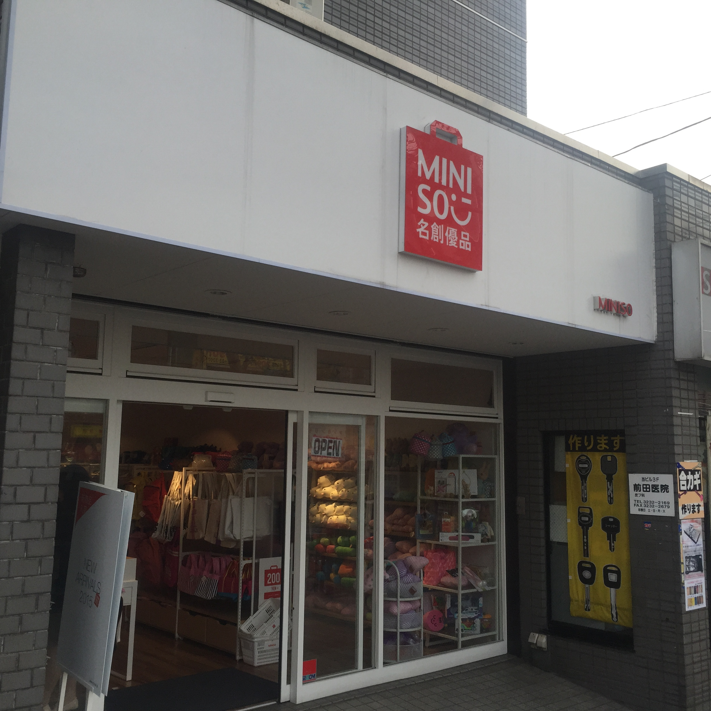 高田馬場に所在する名創優品早稲田旗艦店の写真。